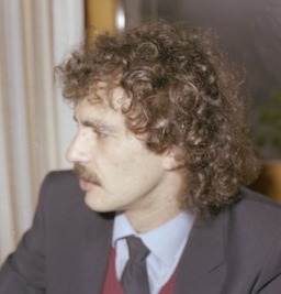 Jesus Mari Satrustegi in 1981